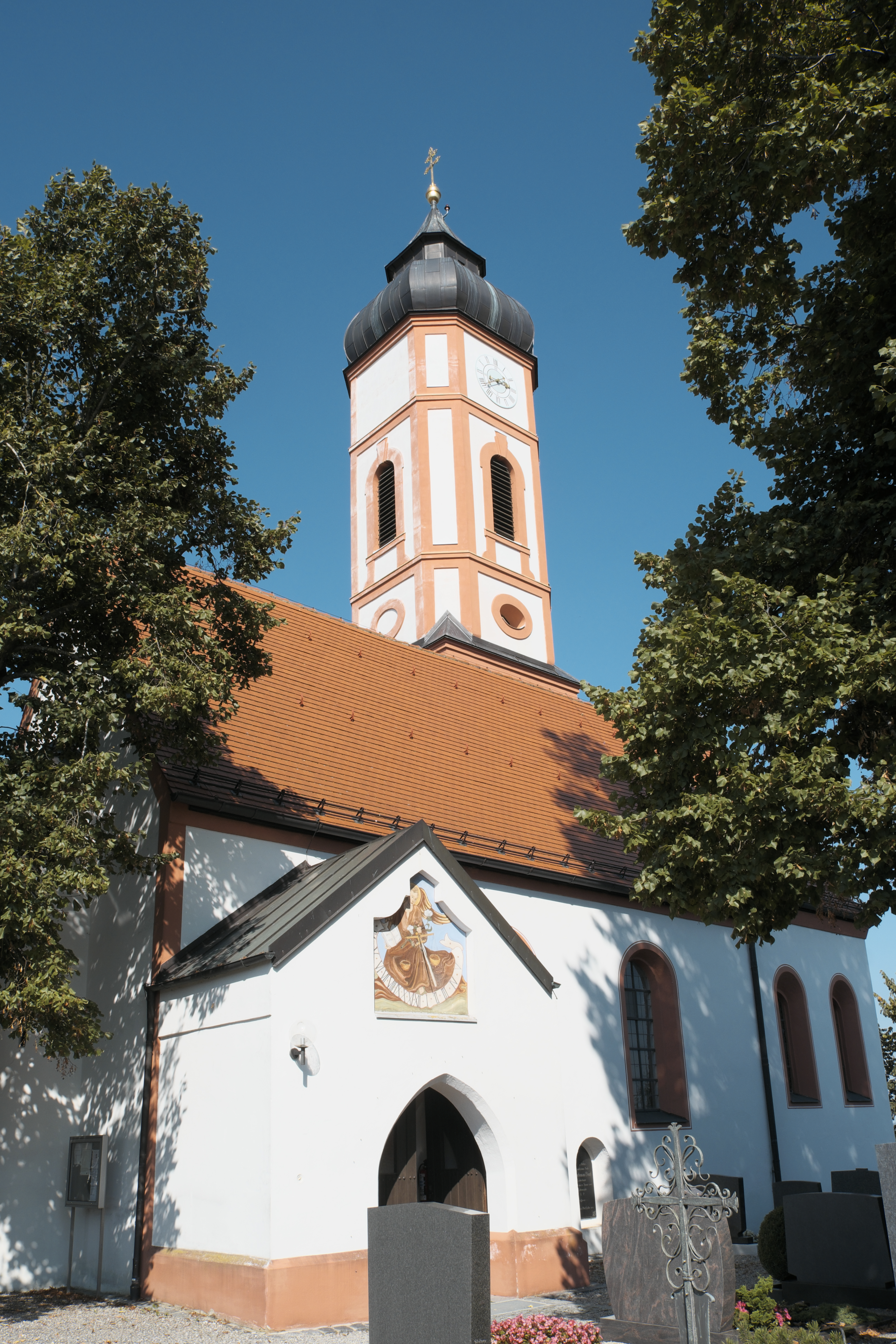 Katholische Filialkirche St. Sebastian in Puch, einem Stadtteil von Fürstenfeldbruck im Landkreis Fürstenfeldbruck (Bayern/Deutschland)